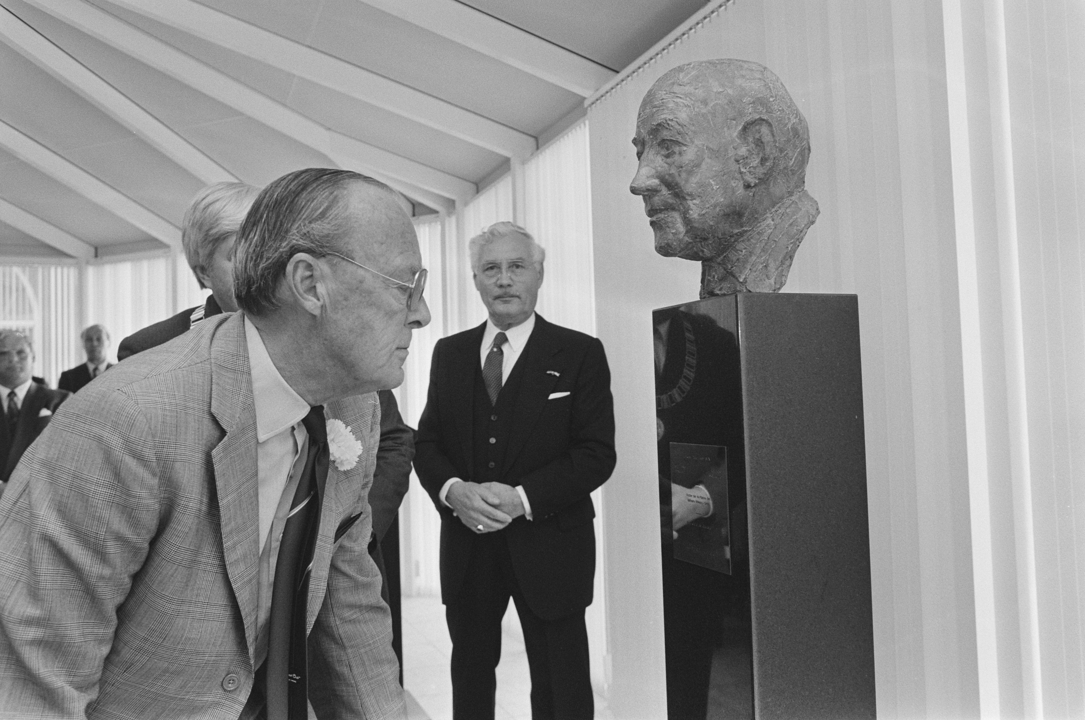 Collectie / Archief : Fotocollectie Anefo Reportage / Serie : [ onbekend ] Beschrijving : Prins Bernhard onthulde in s Graveland borstbeeld jhr. Pieter Jacob Six Datum : 27 april 1987 Locatie : 's-Graveland, Noord-Holland Trefwoorden : borstbeelden, onthullingen, prinsen Persoonsnaam : Bernhard, prins Fotograaf : Croes, Rob C. / Anefo Auteursrechthebbende : Nationaal Archief Materiaalsoort : Negatief (zwart/wit) Nummer archiefinventaris : bekijk toegang 2.24.01.05 Bestanddeelnummer : 933-9636